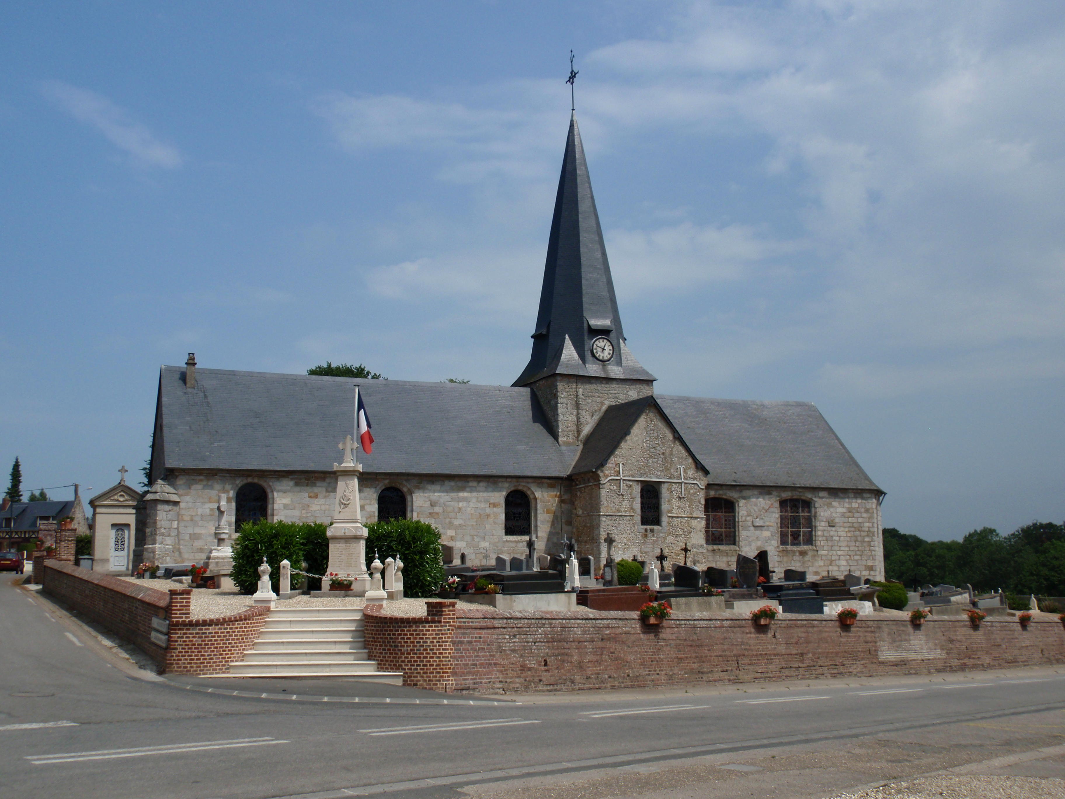 Bourville, Seine Maritime, France